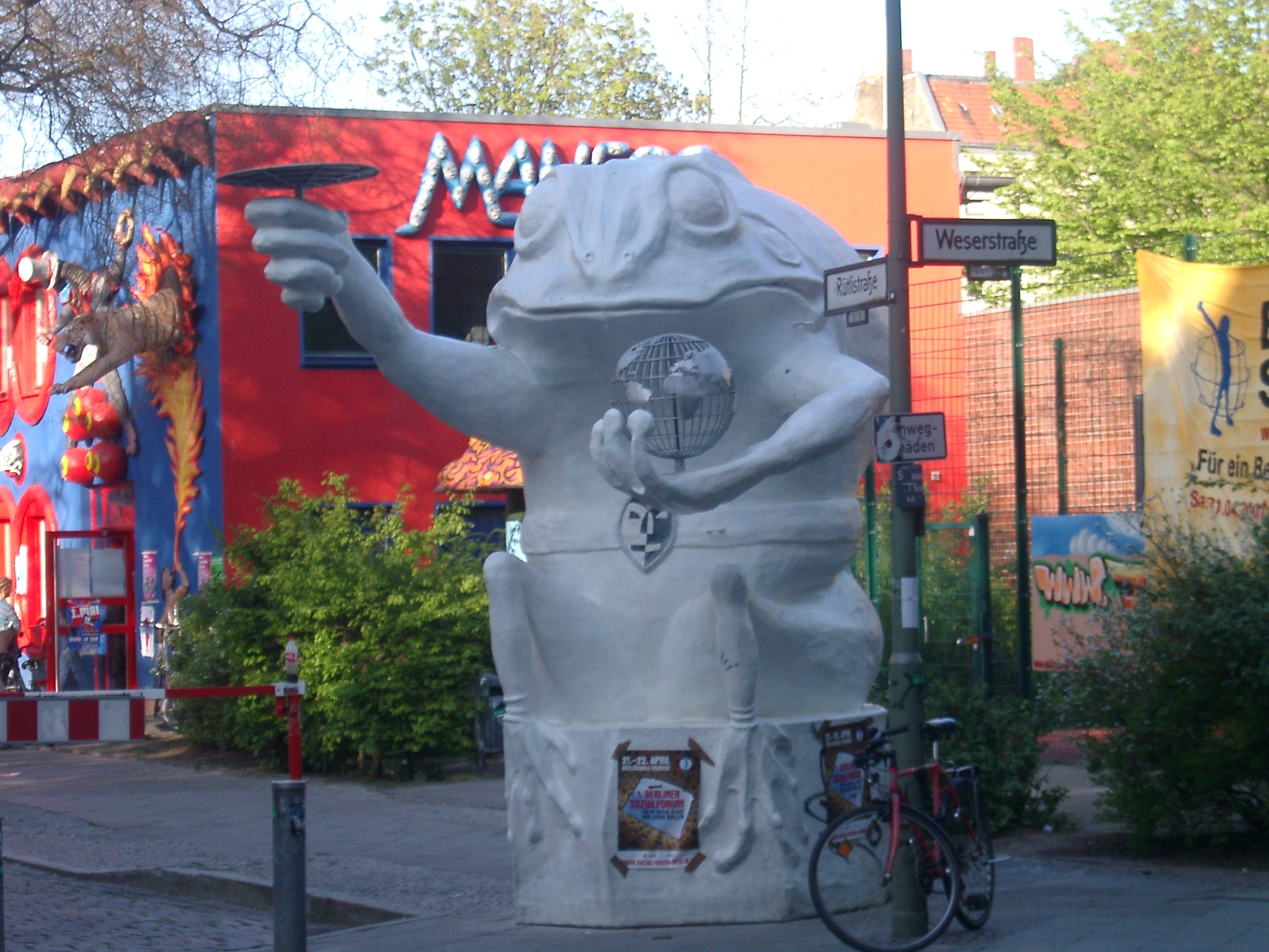 entrance to Rütli-Street in Berlin-Neukölln, right side